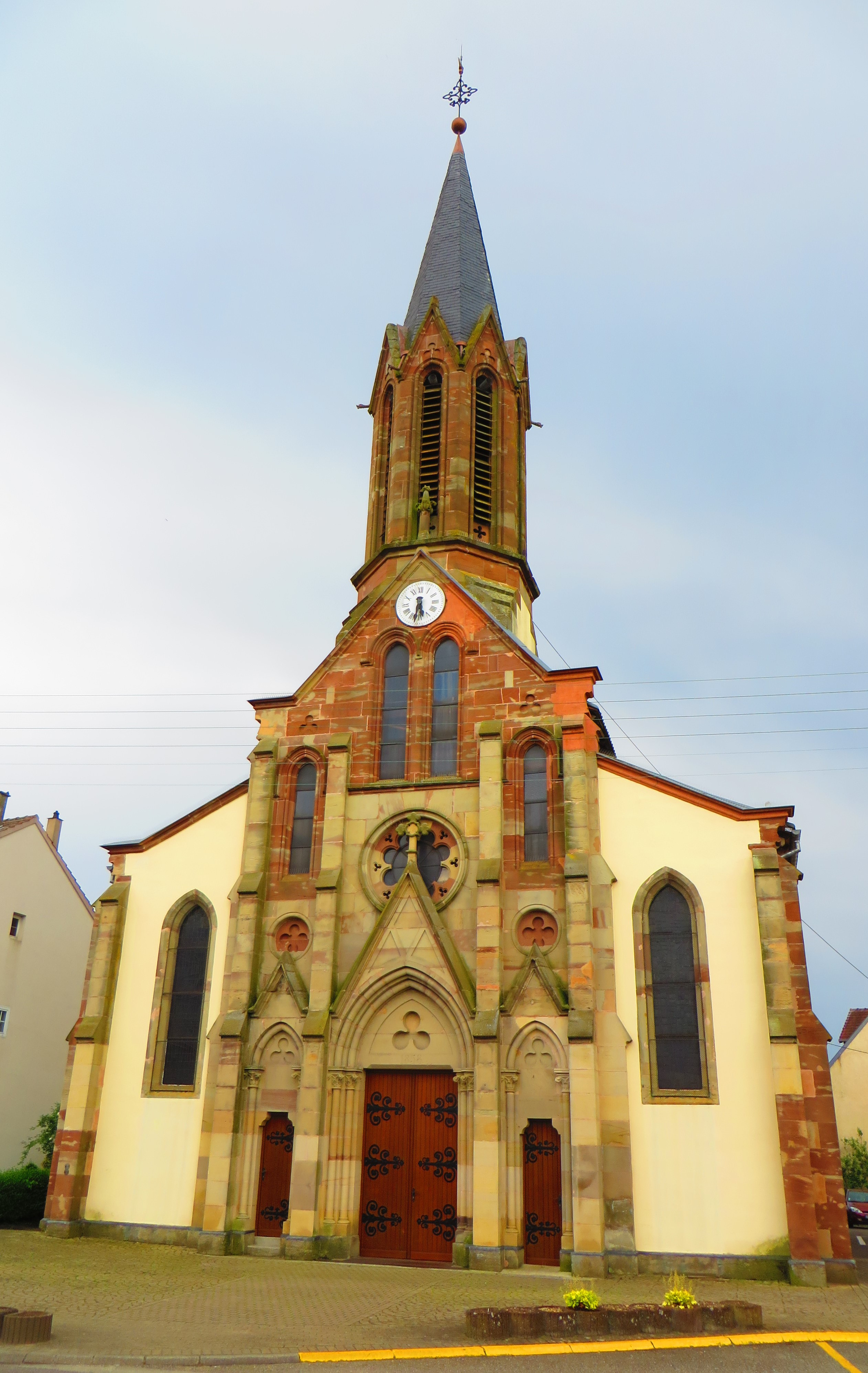 Hundling Église Saint-Jacques-le-Majeur